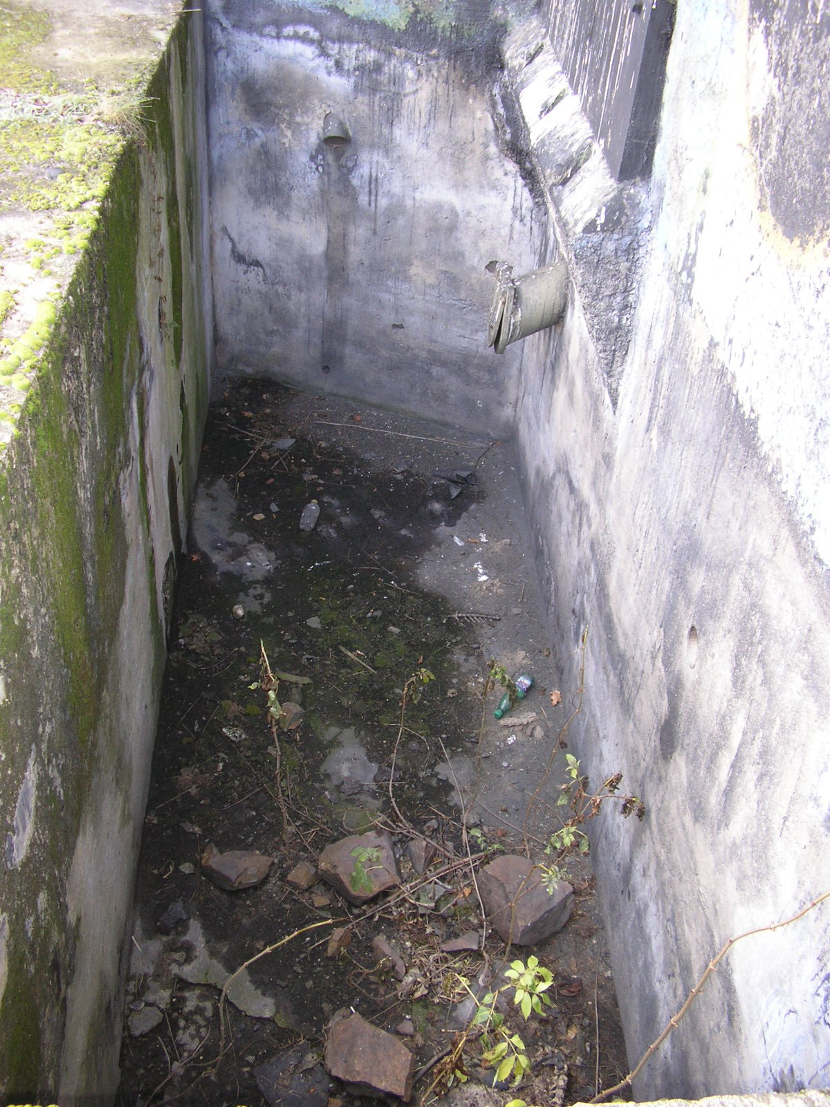 Levý diamantový příkop pěchotního srubu MJ-S 16 Výběžek